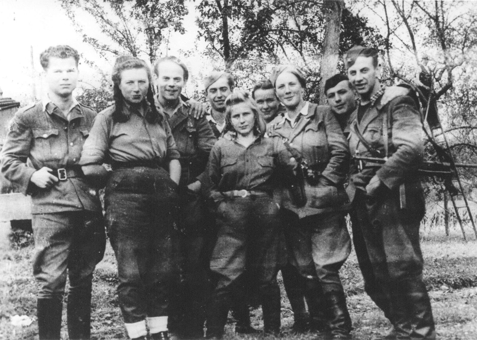 Okrožni komite SKOJ-a za Celje na Ljubnem oktobra 1944.